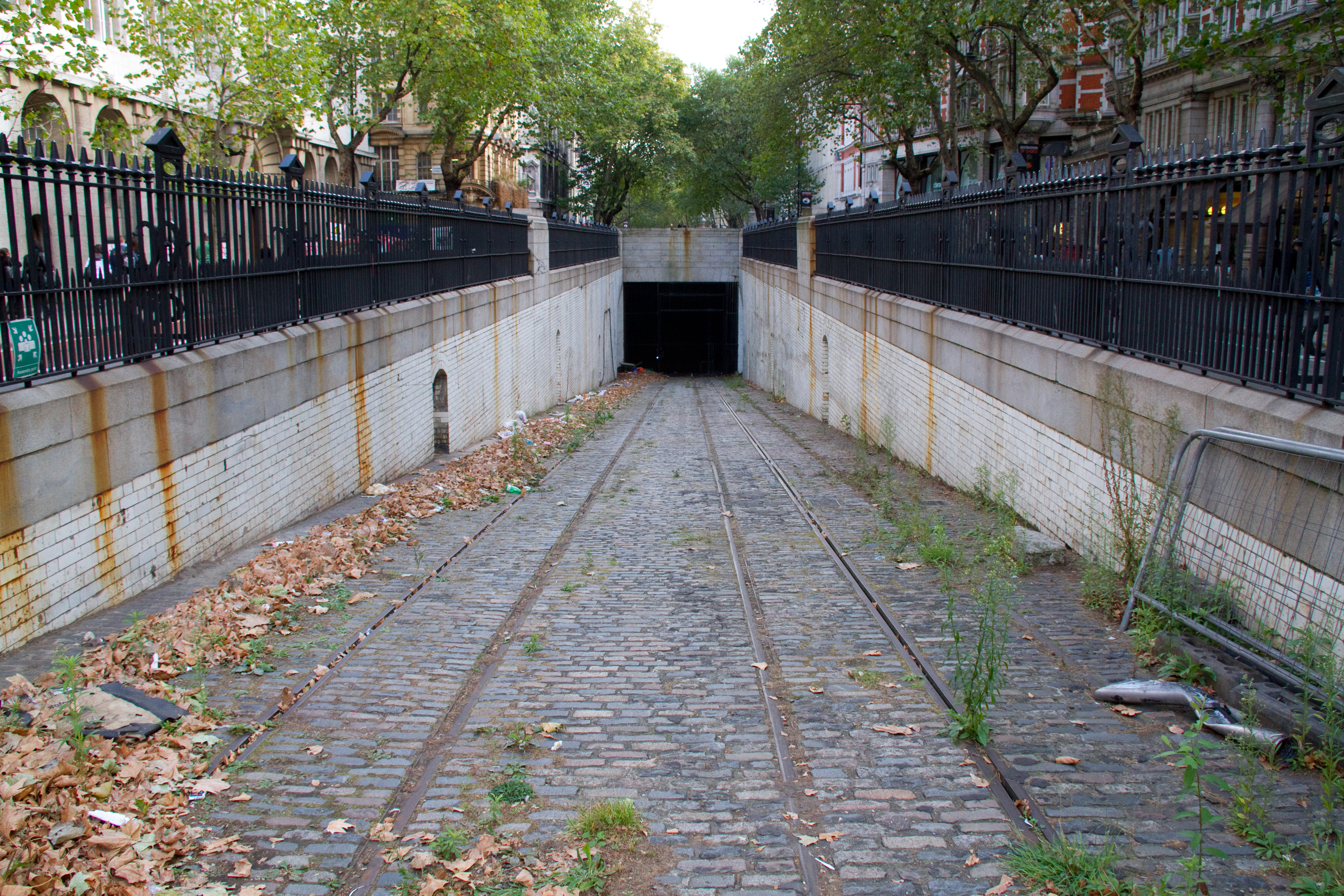 Kingsway tramway subway